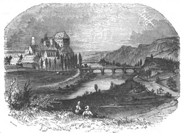 Siegmaringen.